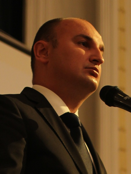 Aleksandar Džombić